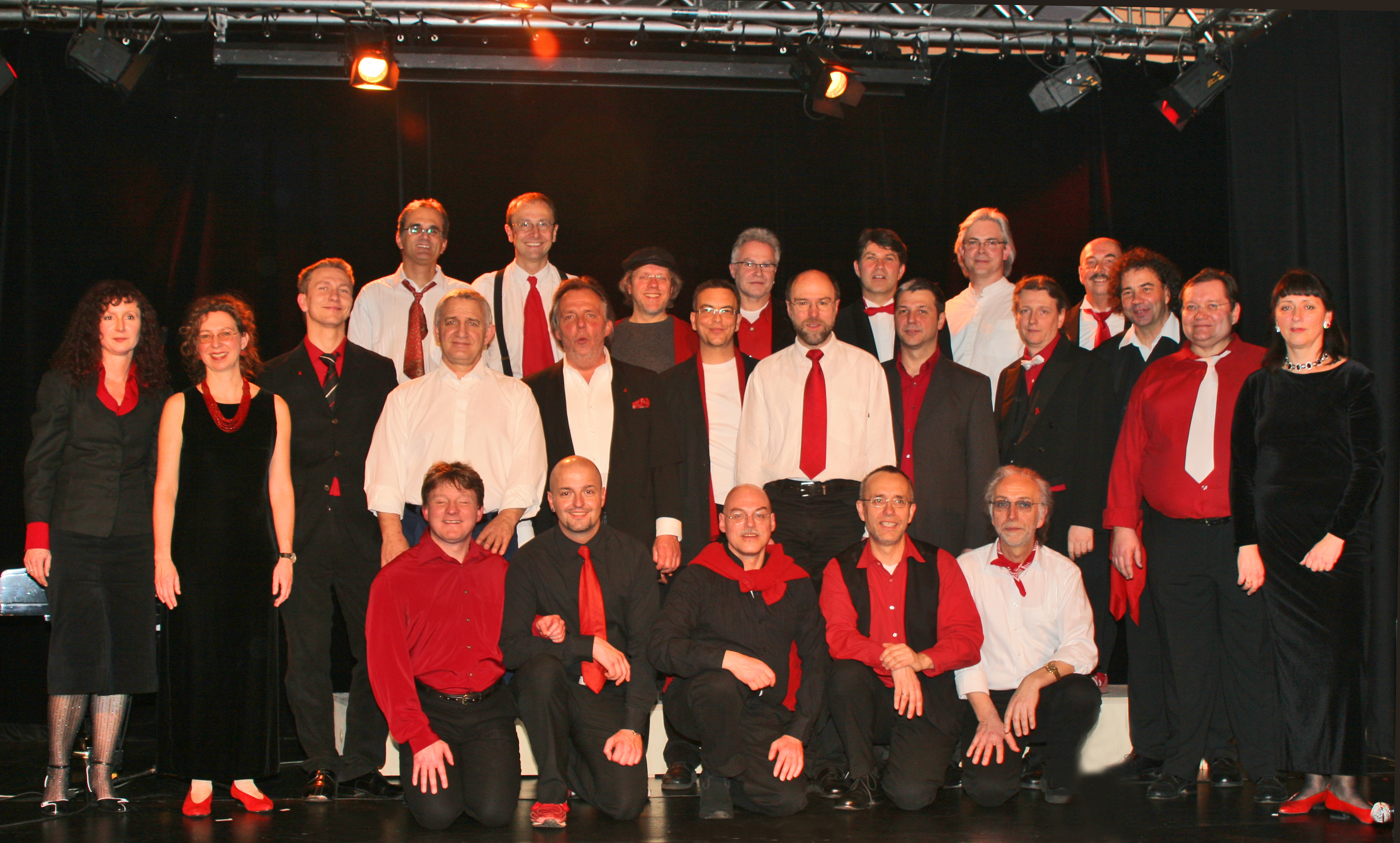 Der Gemischte Saarbrücker Herrenchor (Belle Etage, Spielbank Saarbrücken)